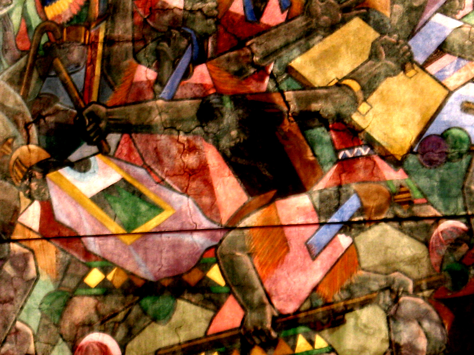 Escena de la guerra de Incas contra Chancas